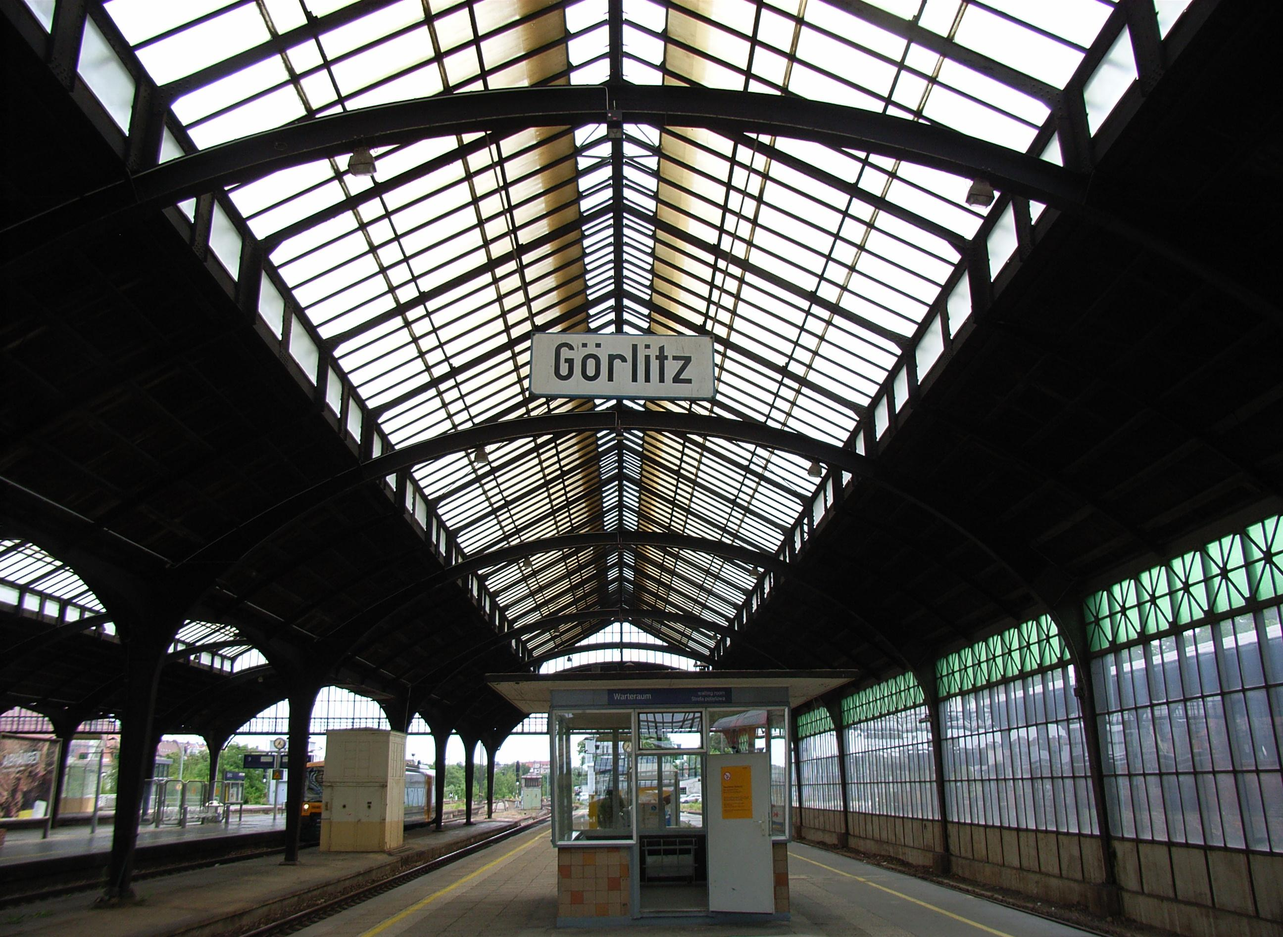 Bahnsteig 4 mit den Gleisen 11 und 12 unter der Bahnhofshalle des Görlitzer Bahnhofes